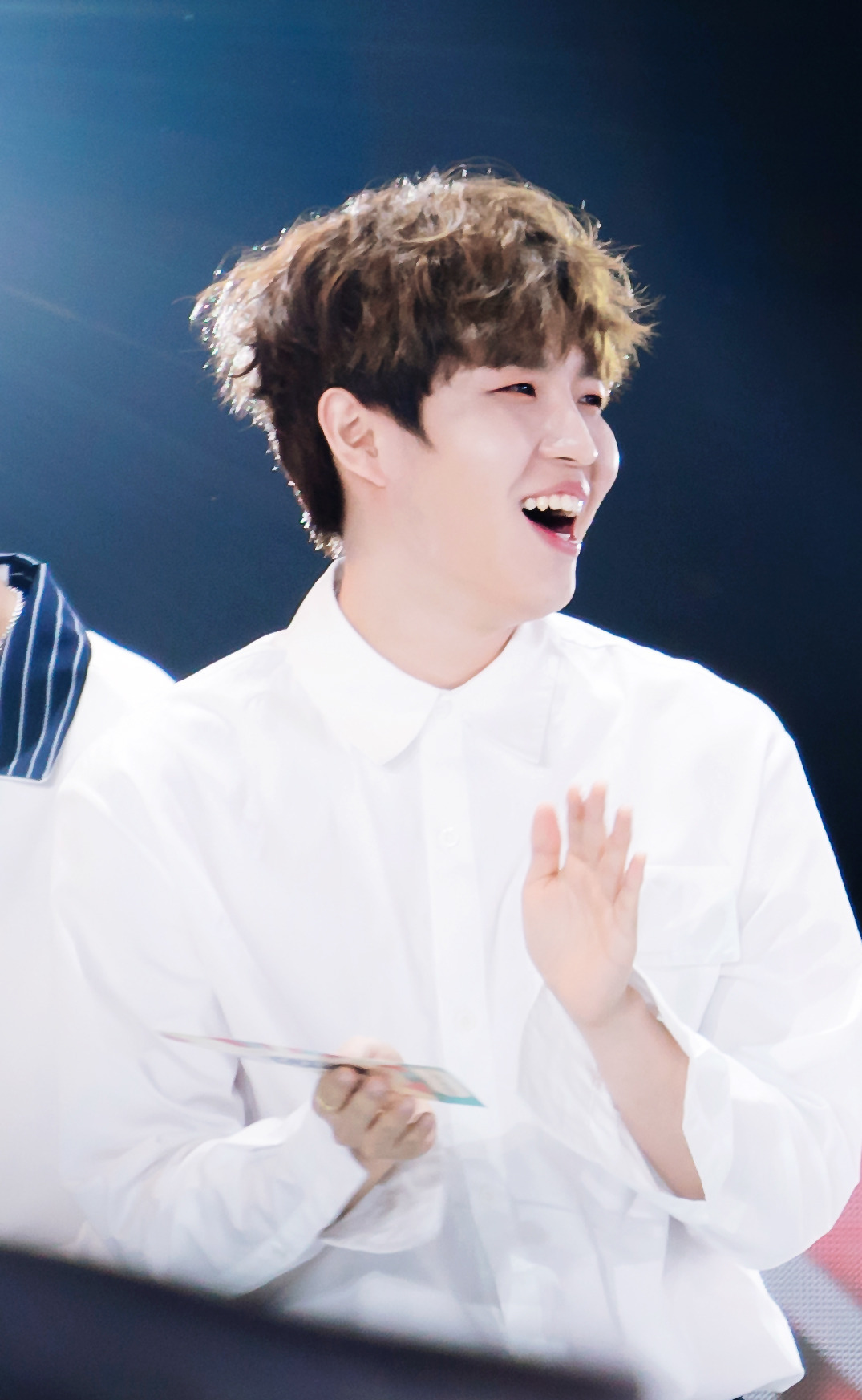 171022 부산원아시아페스티벌